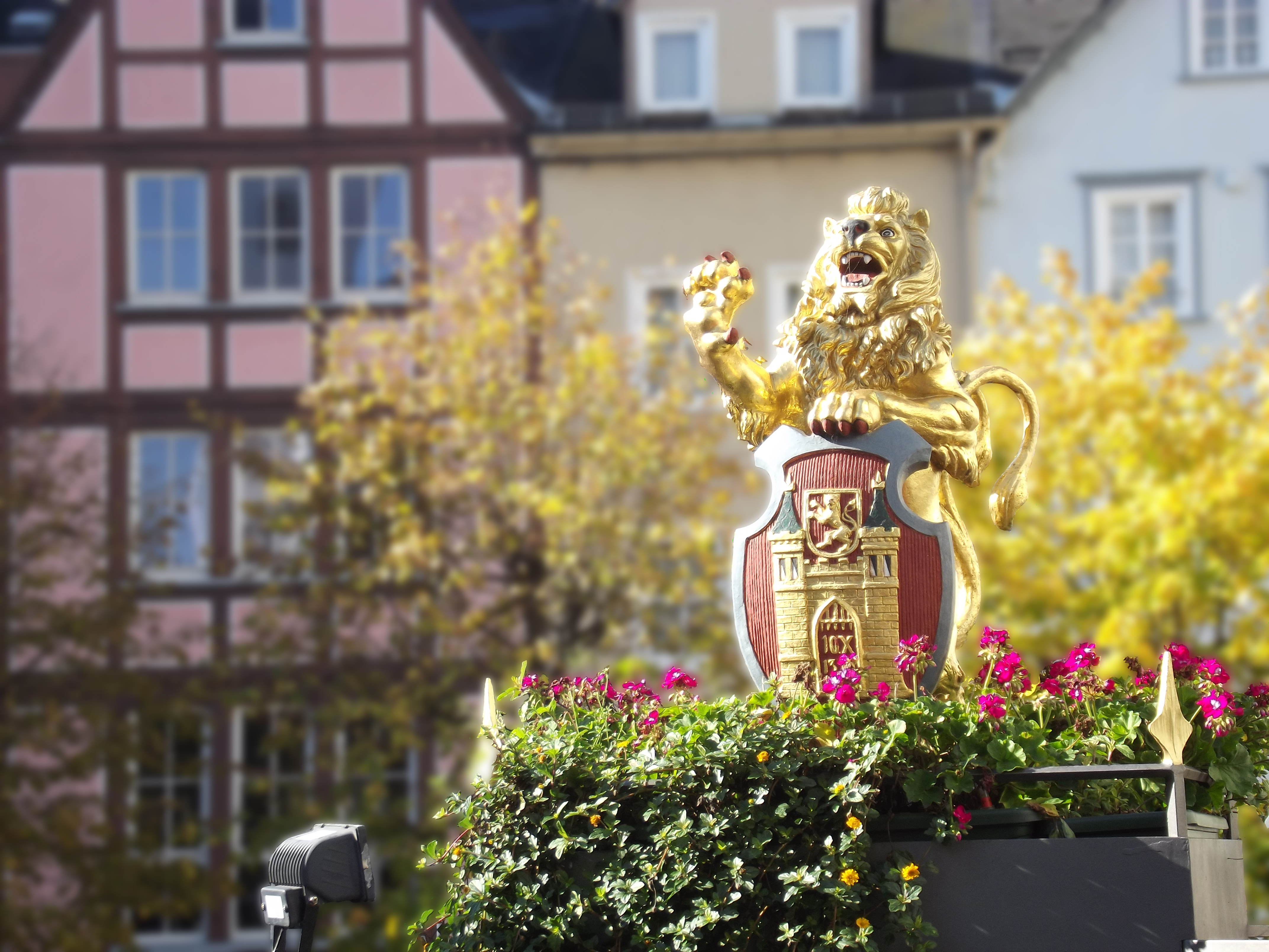 Löwe am Alten Marktplatz - Wahrzeichen von Hachenburg